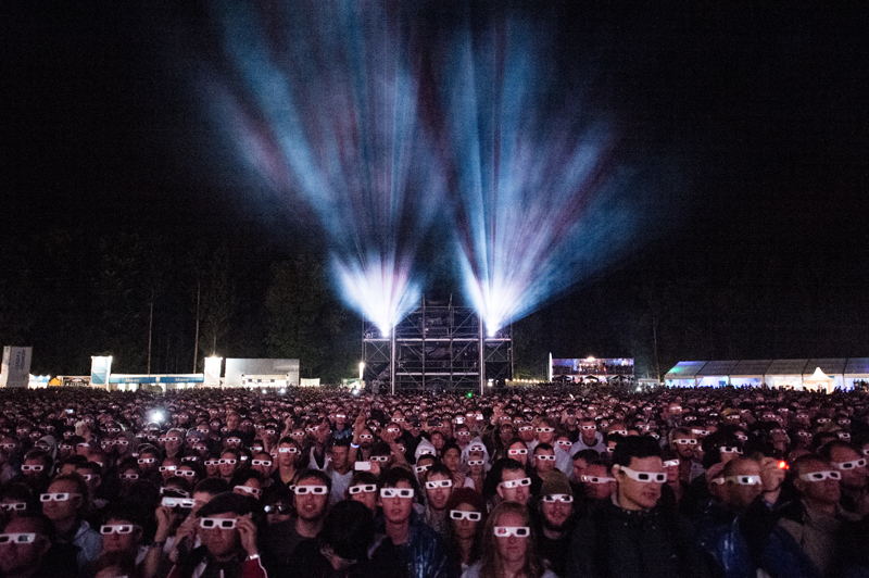 Kraftwerk mit 3D-Show am Zürich Openair 2012